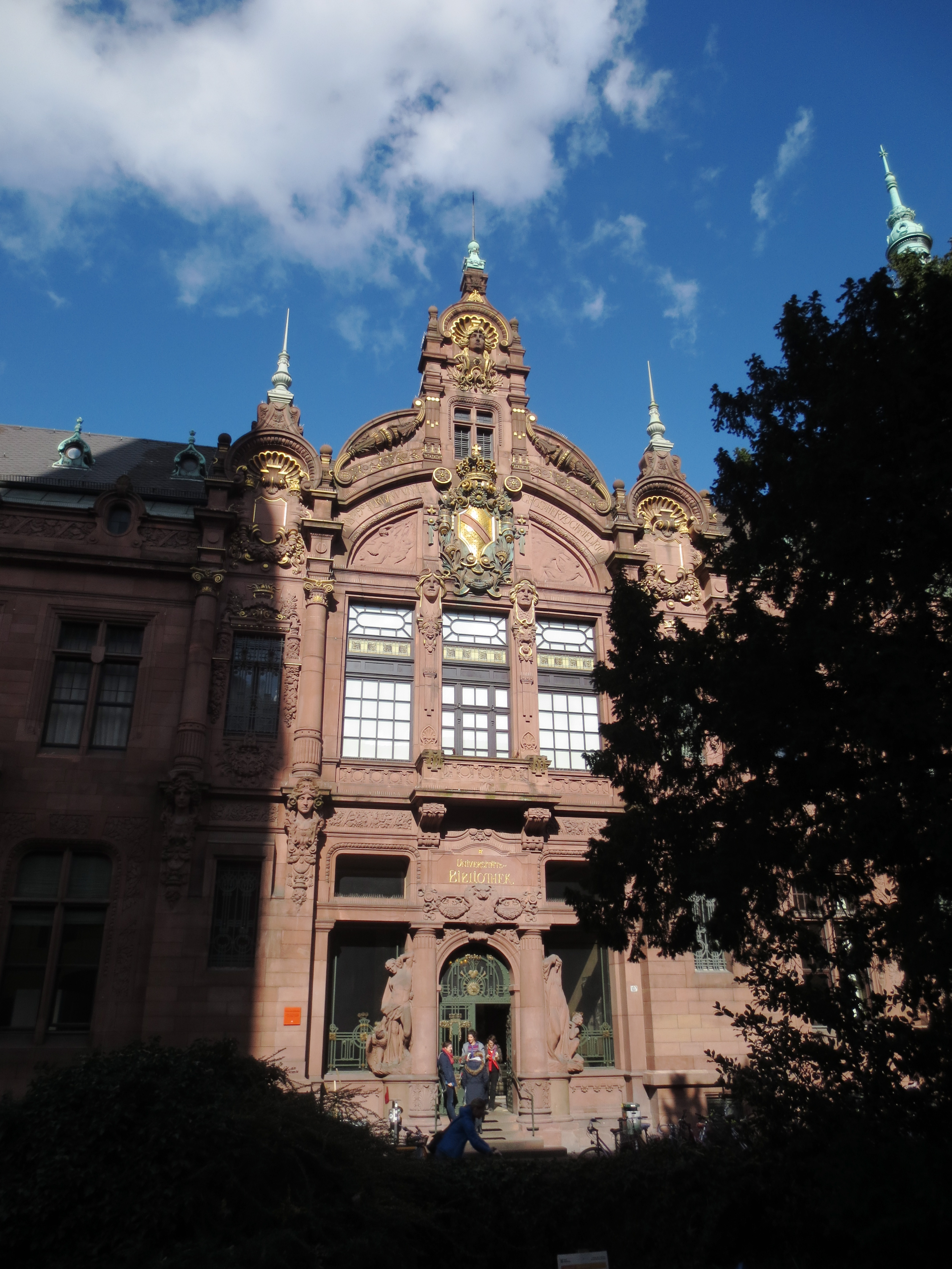 Heidelberger Altstadt, Portal der Universitätsbibliothek Heidelberg mit Schatten der Peterskirche und den Bäumen des Kirchgartens